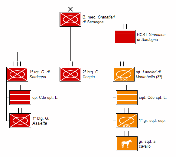 Struttura della Brigata Meccanizzata "Granatieri di Sardegna" (2016)